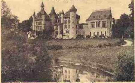 chateau de Clavières, Ayrens (15)